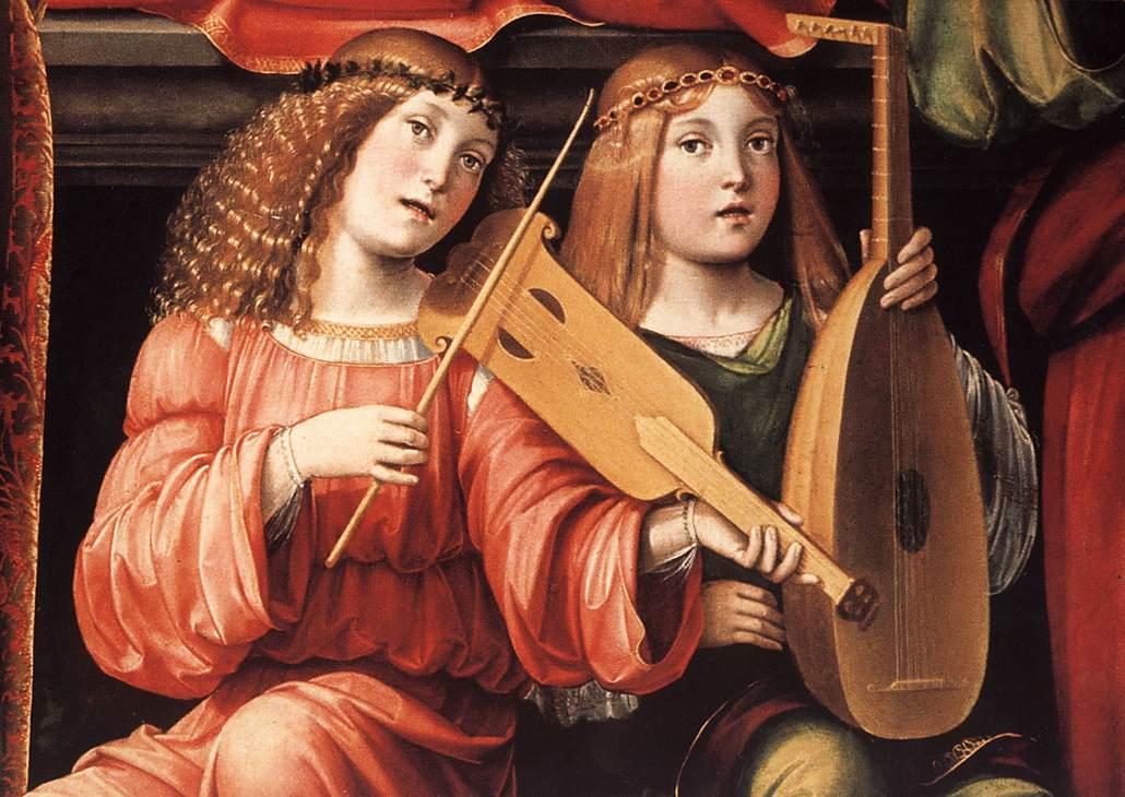 detail